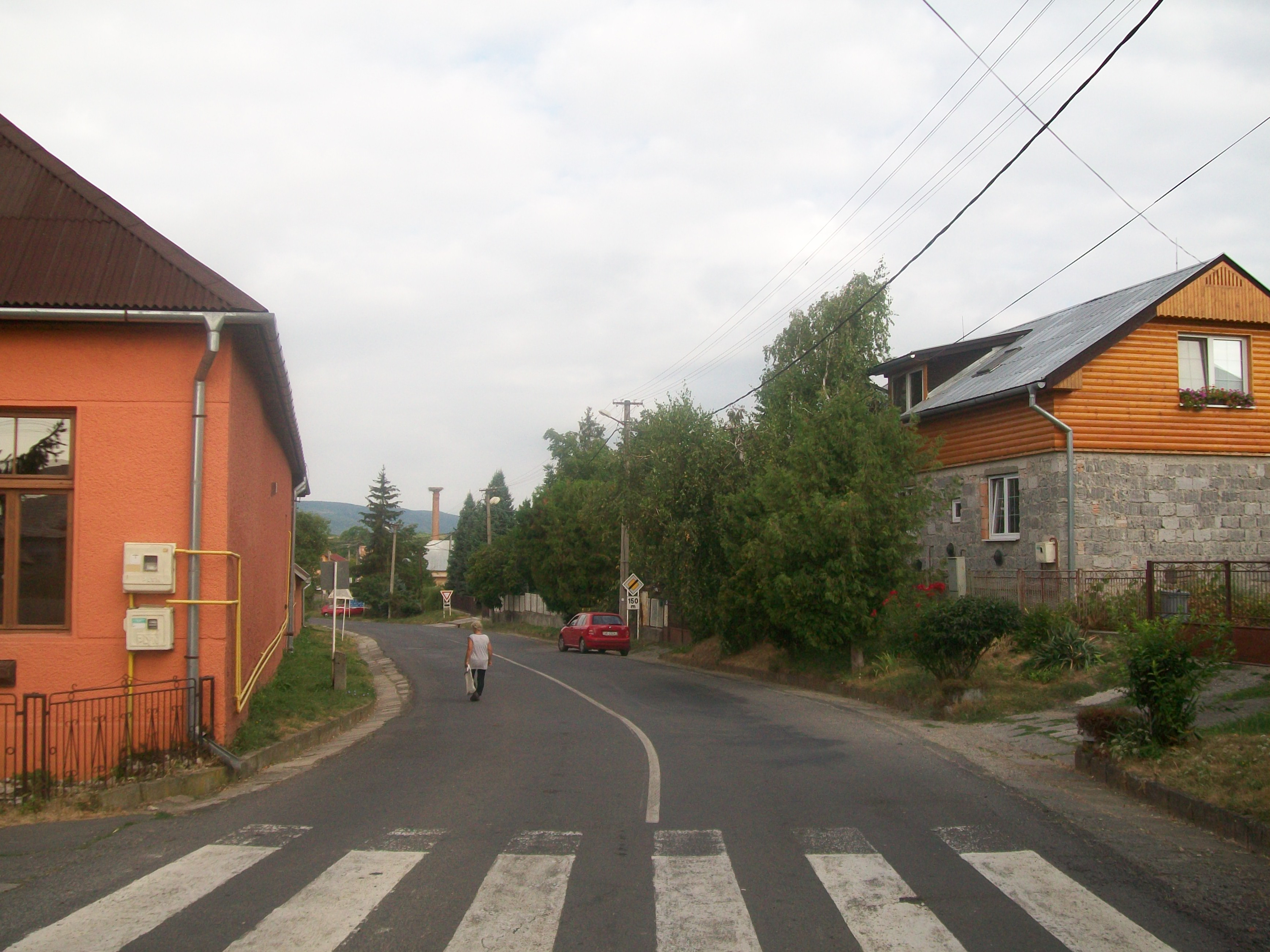 Ulica obce Pôtor